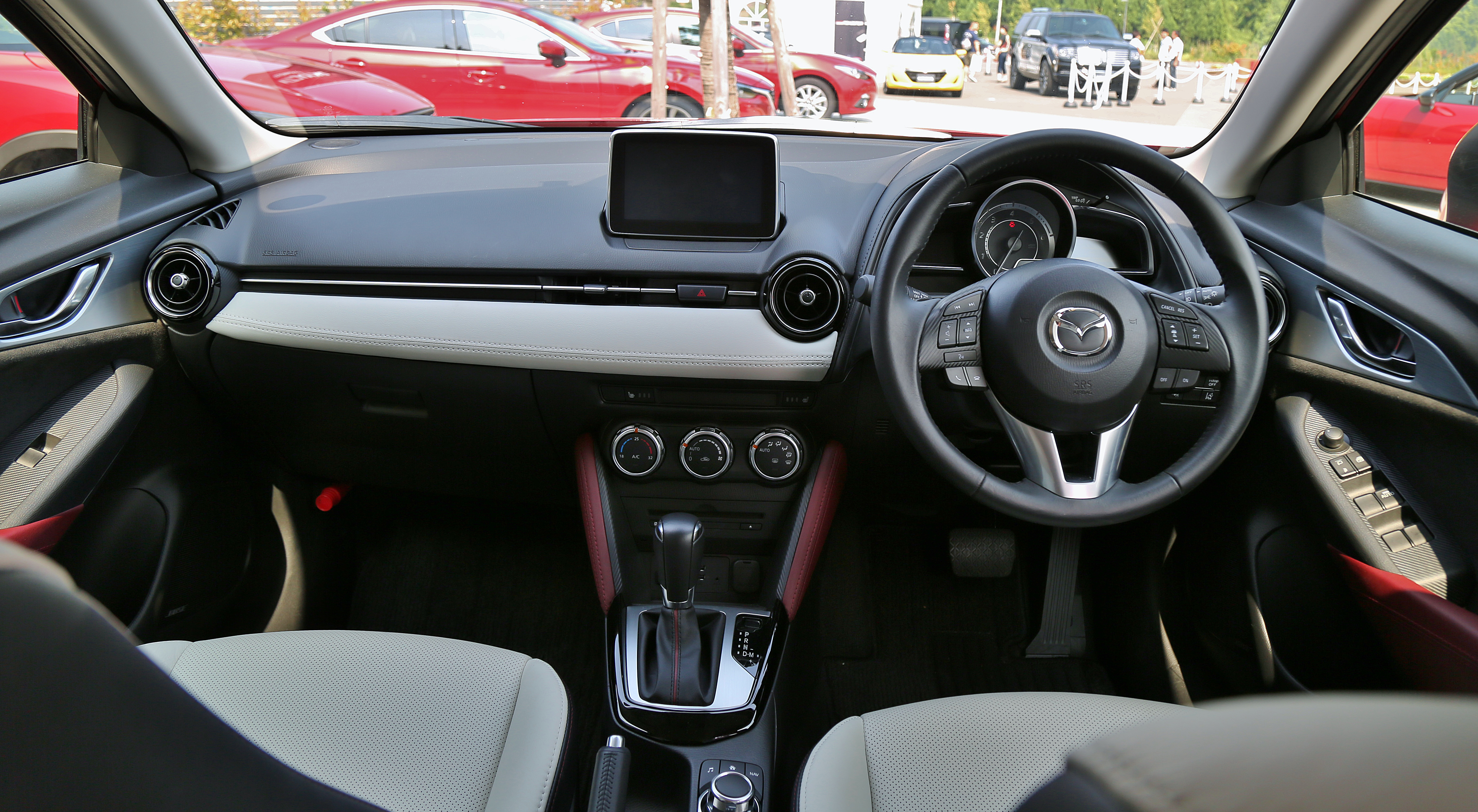 Mazda CX-3